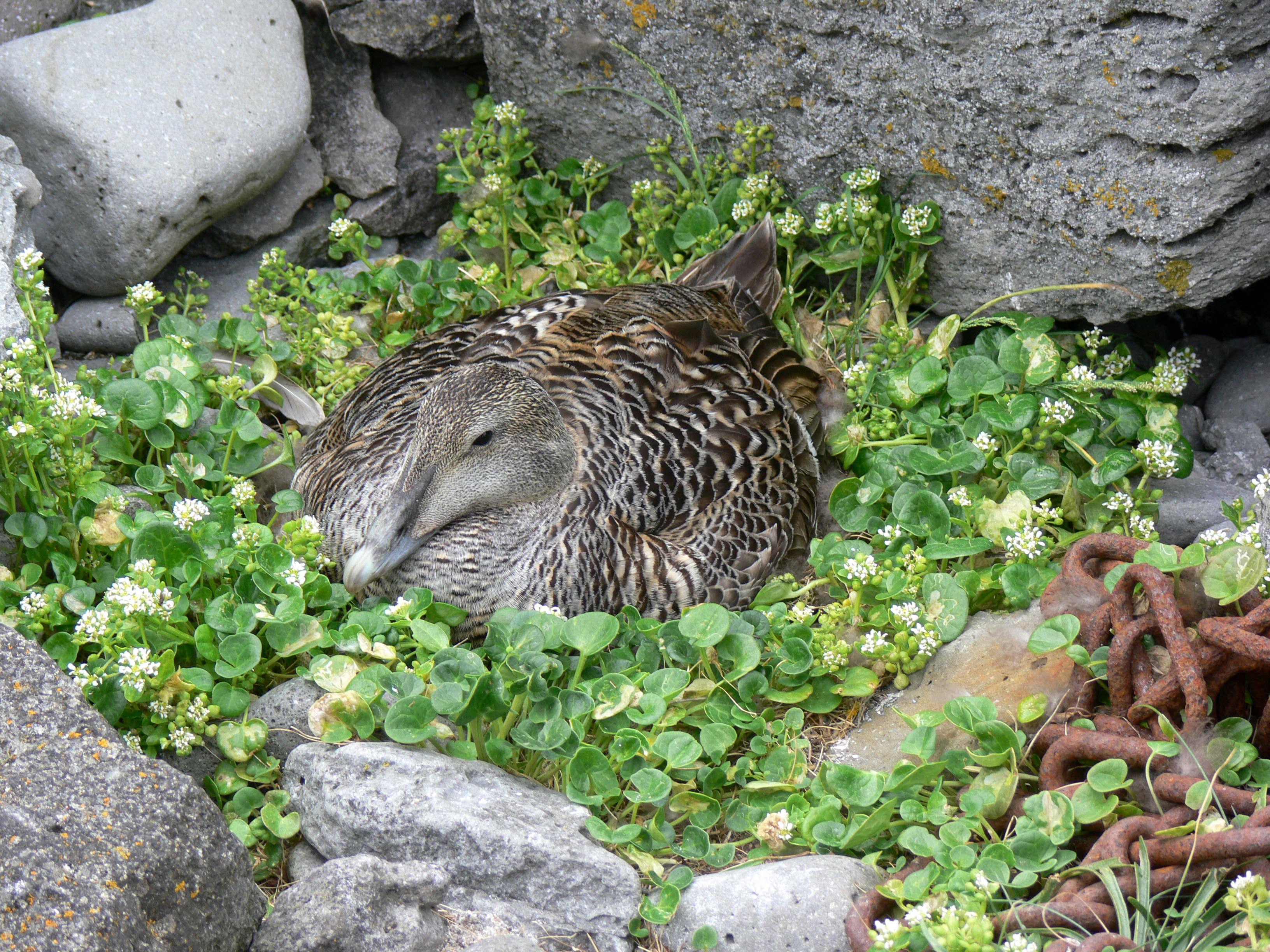 eiderenteauf der Insel Vigur im Ísafjarðardjúp.